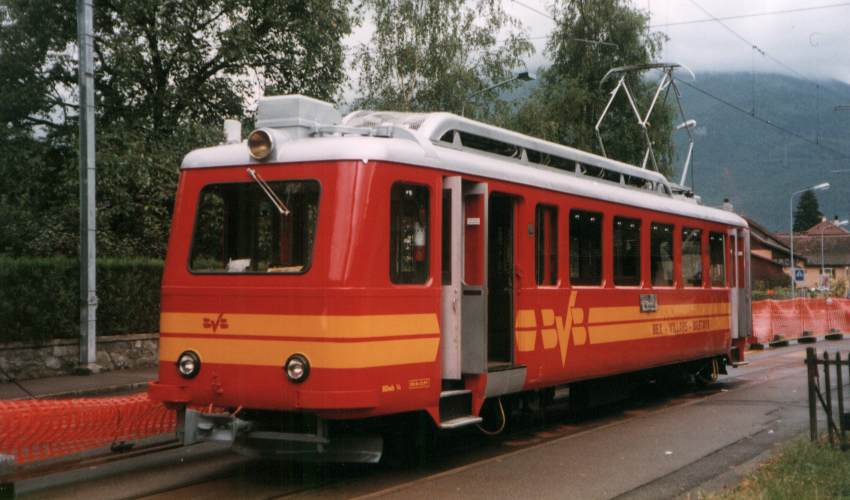 Description